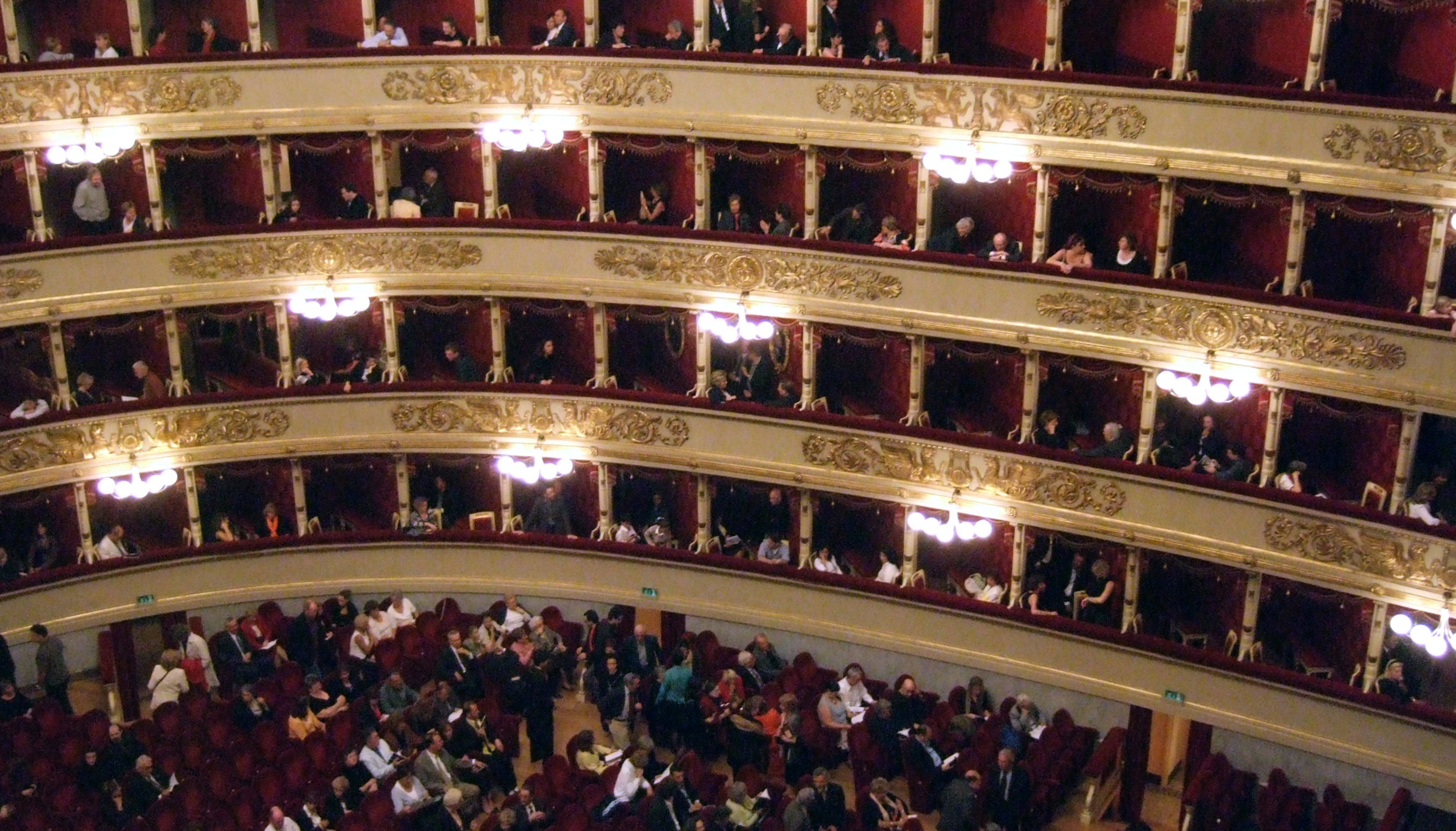 *Sujet:D'Scala bannenan Source:Foto vum Commons-Benotzer Stevage, "verschafft" vum Benotzer:Cornischong